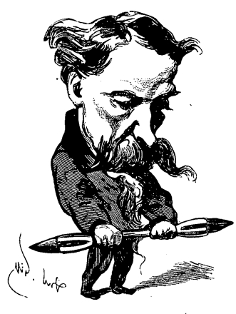 French illustrator and caricaturist Amédée de Noé a.k.a. Cham (1818-1879) by André Gill (1840-1885)